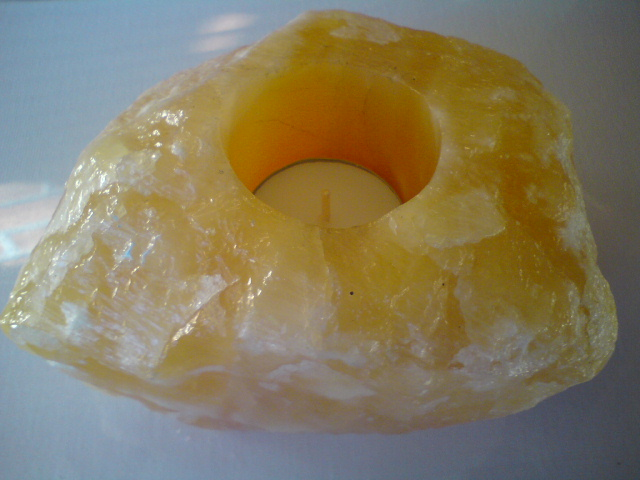 Kalsitt (Kals`itt) Kalkspatt